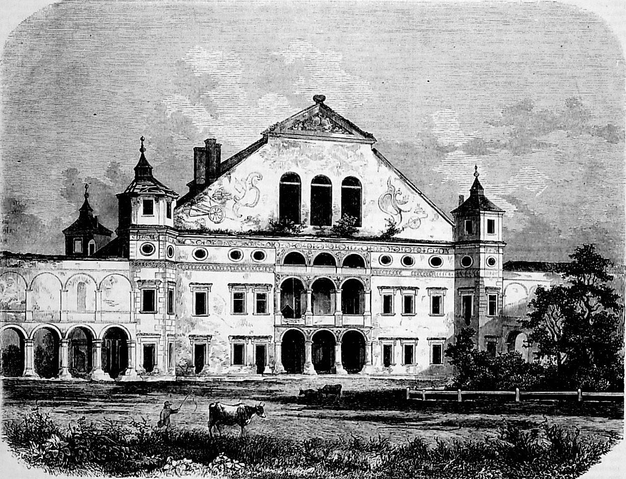 Nieistniejący już pałac w Białej Podlaskiej